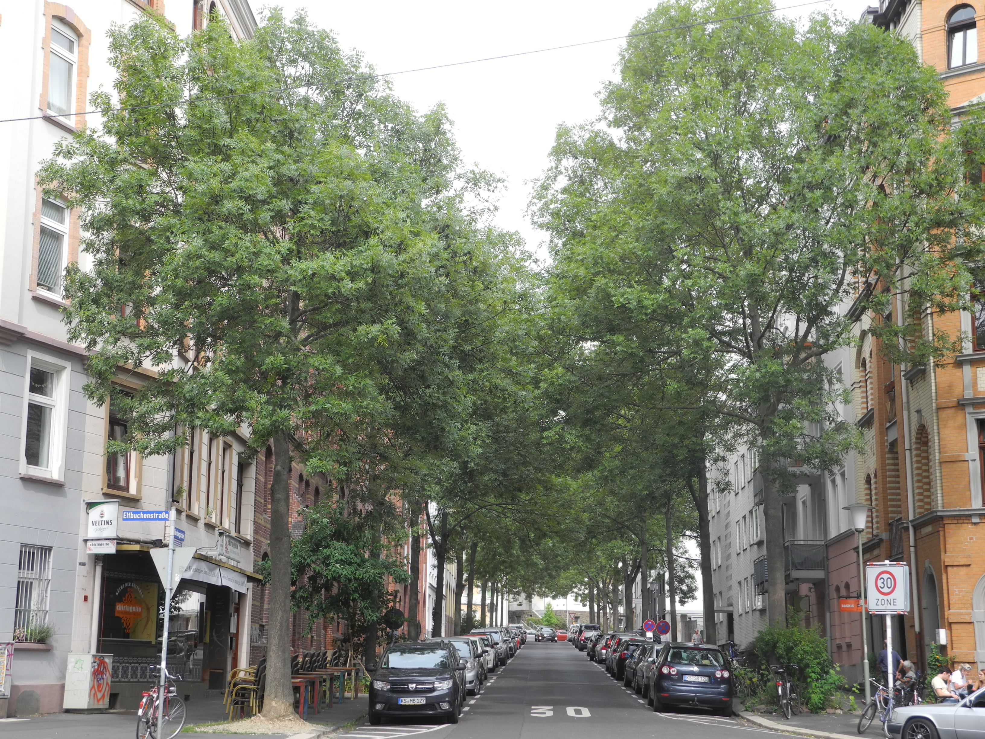 7000 Eichen – Stadtverwaldung statt Stadtverwaltung, eine soziale Plastik von Joseph Beuys, gestartet 1982 auf der documenta 7 in Kassel, Hessen, Deutschland. Standort: Dörnbergstraße, Nordteil Art: Gemeine Esche (Fraxinus excelsior 'Westhofs Glorie' ) Pflanzjahr: 1987